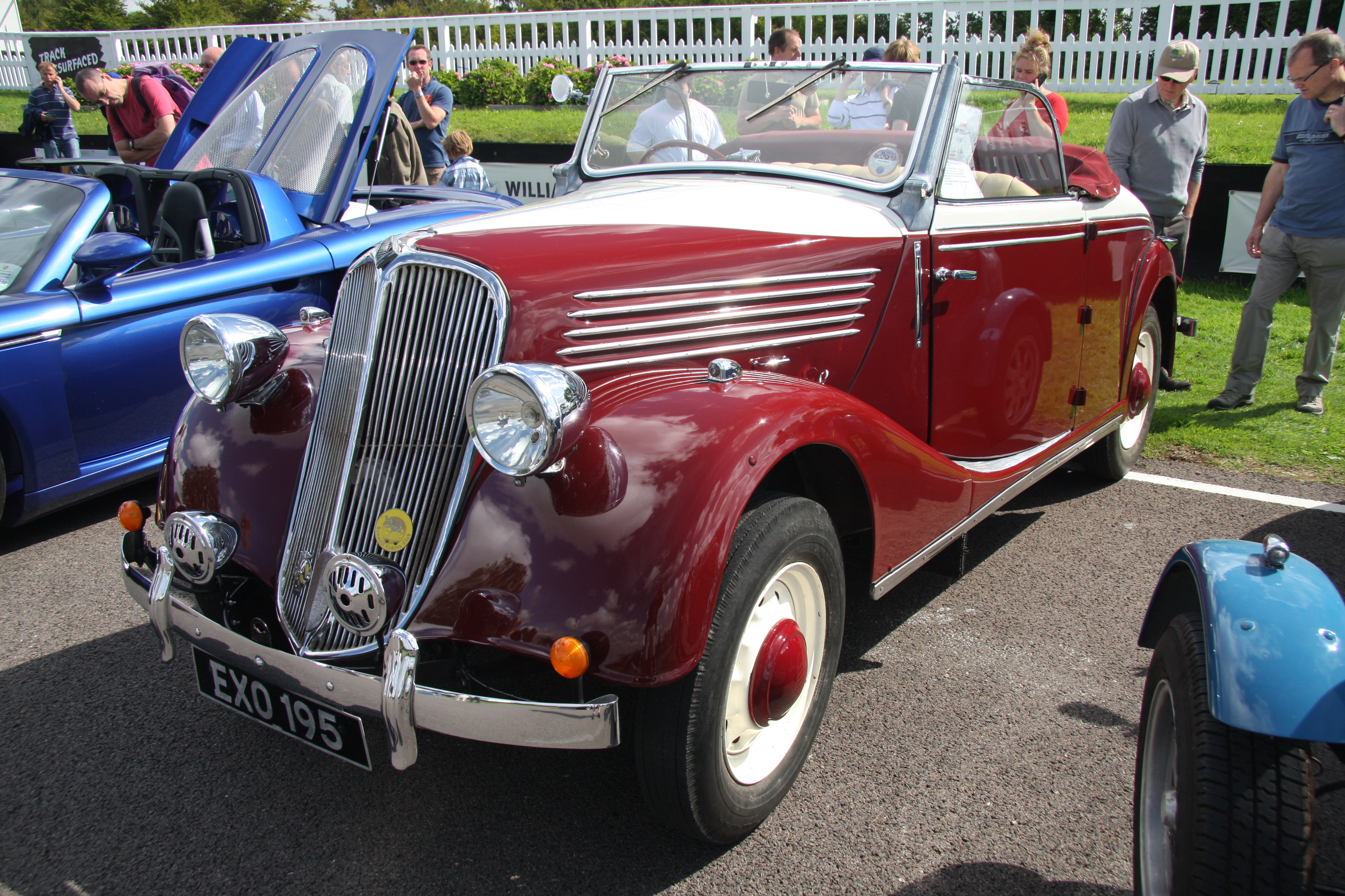 1937 Renault Celtaquatre Coupe